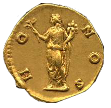 Honos-Darstellung auf Aureus (Mark Aurel) crf. Cohen 235 (140/143 CE)